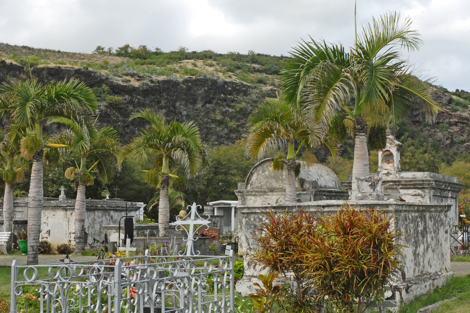 Le cimetière marin a été implanté, en 1788, sur ce site de la Baie de Saint-Paul, premier lieu de peuplement par les français de l'Île de la Réunion (appelée à l'époque Île Bourbon). Il comprend dans sa partie nord les sépultures de vieilles familles de Saint-Paul : les Panon, Desbassyns, Delanux, Desjardins, KerAnval,..ou de personnes décédées lors de leur passage comme Eraste Feuillet ou les marins du bâteau naufragé Ker.Anna. Le cimetière a subi une série de catastrophes naturelles depuis le raz de marée d'août 1883 provoqué par l'éruption du volcan de Krakatoa jusqu'aux cyclones récents. Il a été restauré dans les années 70. Les restes mortels du grand poète, Leconte de Lisle, né à Saint-Paul en 1818 et mort à Louveciennes en 1894 y ont été transférés en 1977.